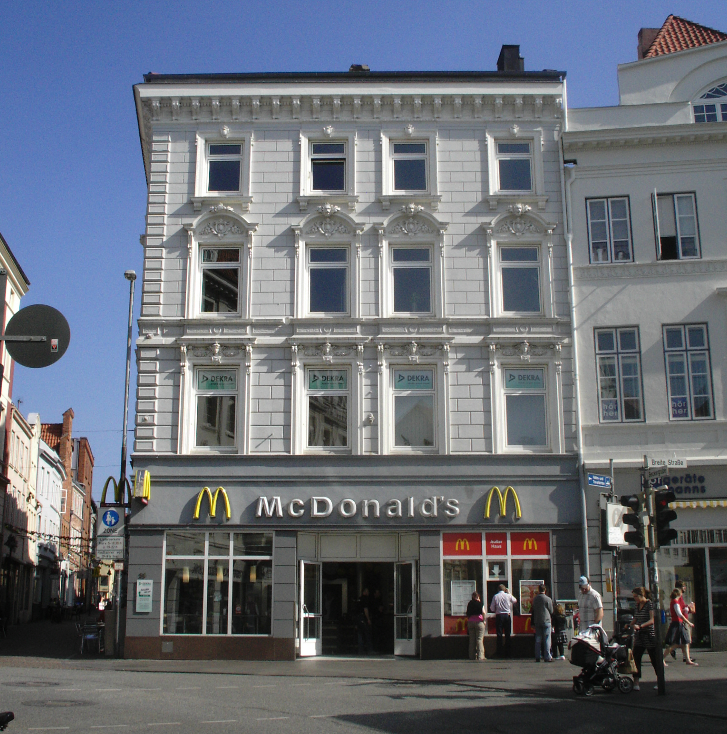 Das ehemalige Kino Bioscope in der Breiten Straße 25 in Lübeck.